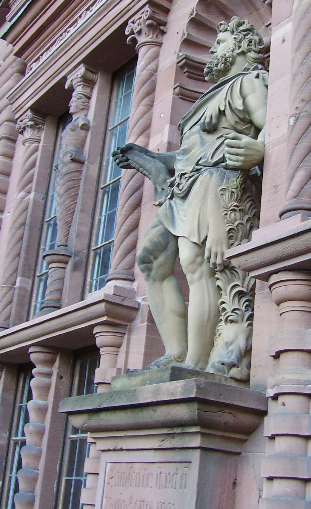 view of Heidelberg Castle